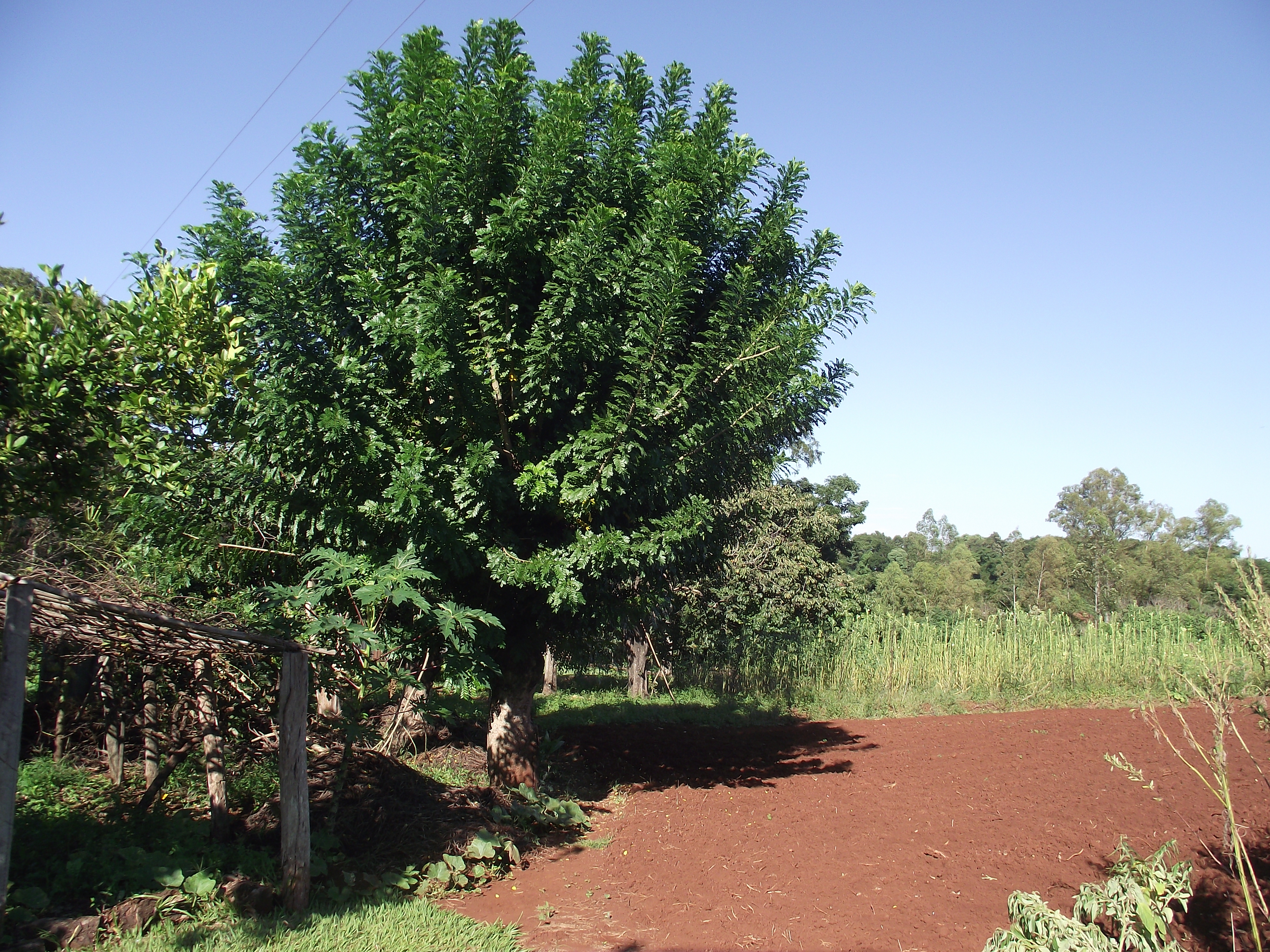 Em Mandaguarí/PR